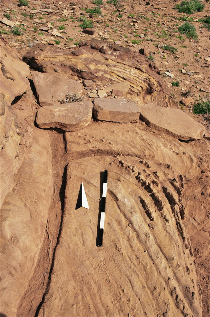 Thermes de al Biyarah. Canal creusé dans le rocher.